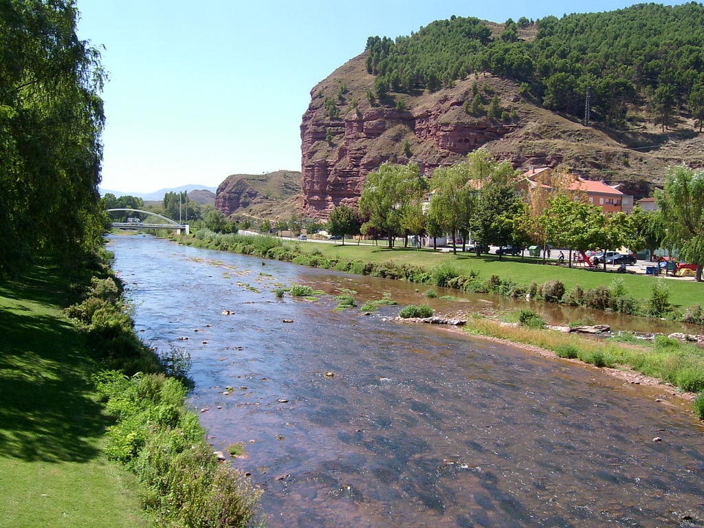 Najerilla River across Nájera (La Rioja, Spain)